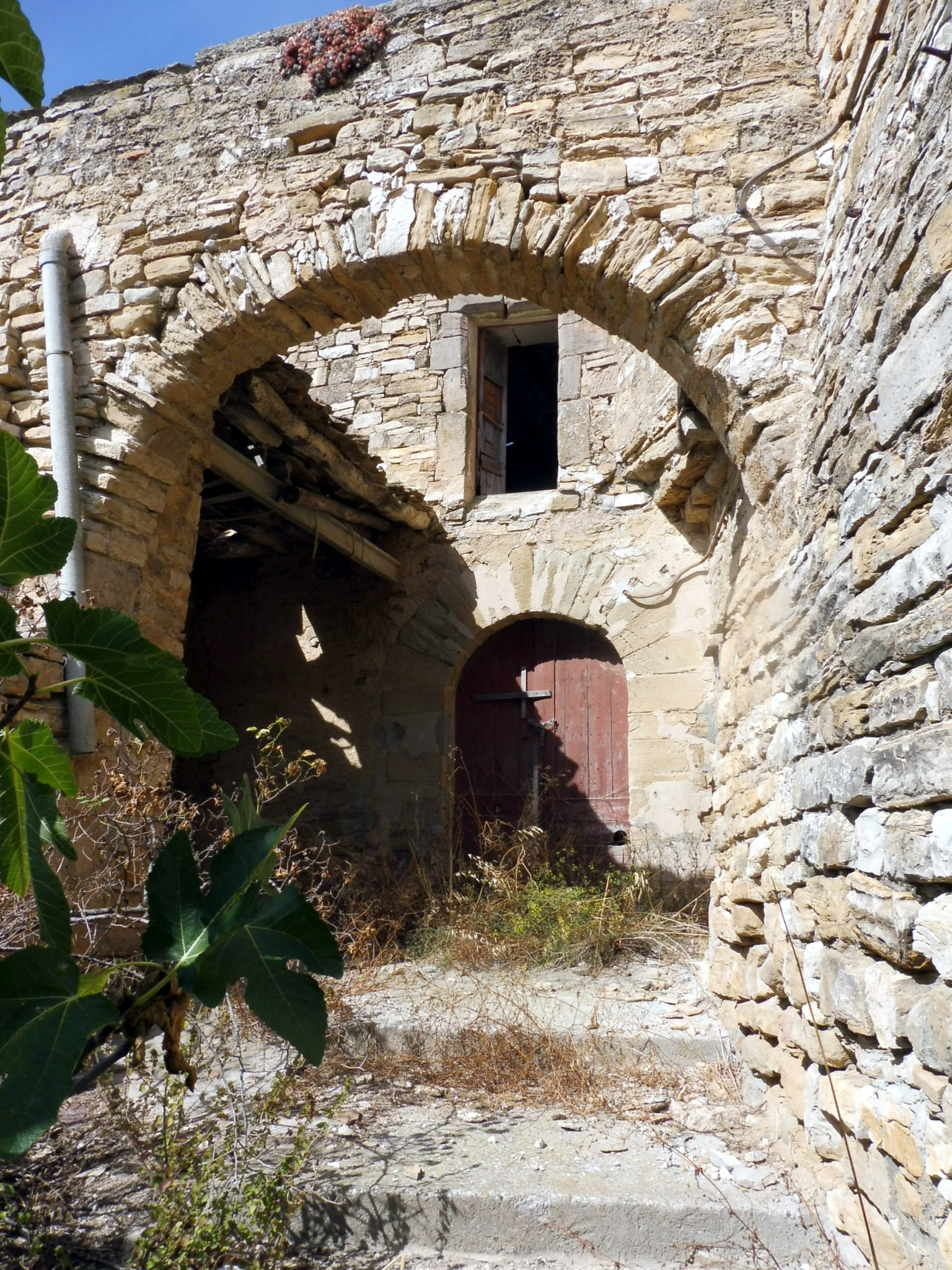 Secanella (Veciana): baluard i portal